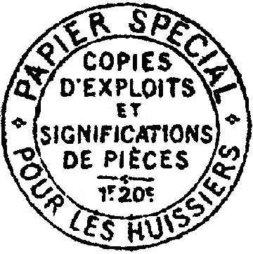 Sello del agente judicial Panmuphle, presente en el libro "Gestas y opiniones del Doctor Faustroll, patafísico"